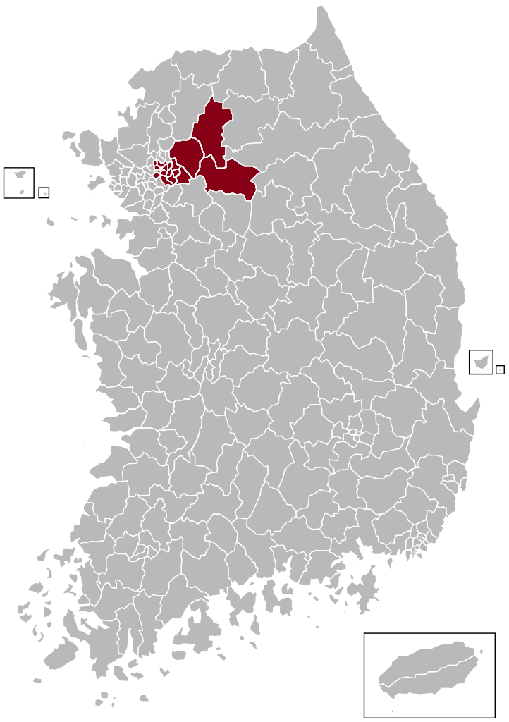 동서울우편집중국 관할구역 지도